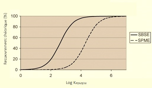 Comparaison de la récupération théorique en fonction du log du coefficient de distribution obtenue par SBSE et SPME